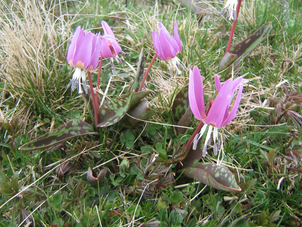 Erythrone dent-de-chien dans les pelouses des monts d'Aubrac (Massif central, France)